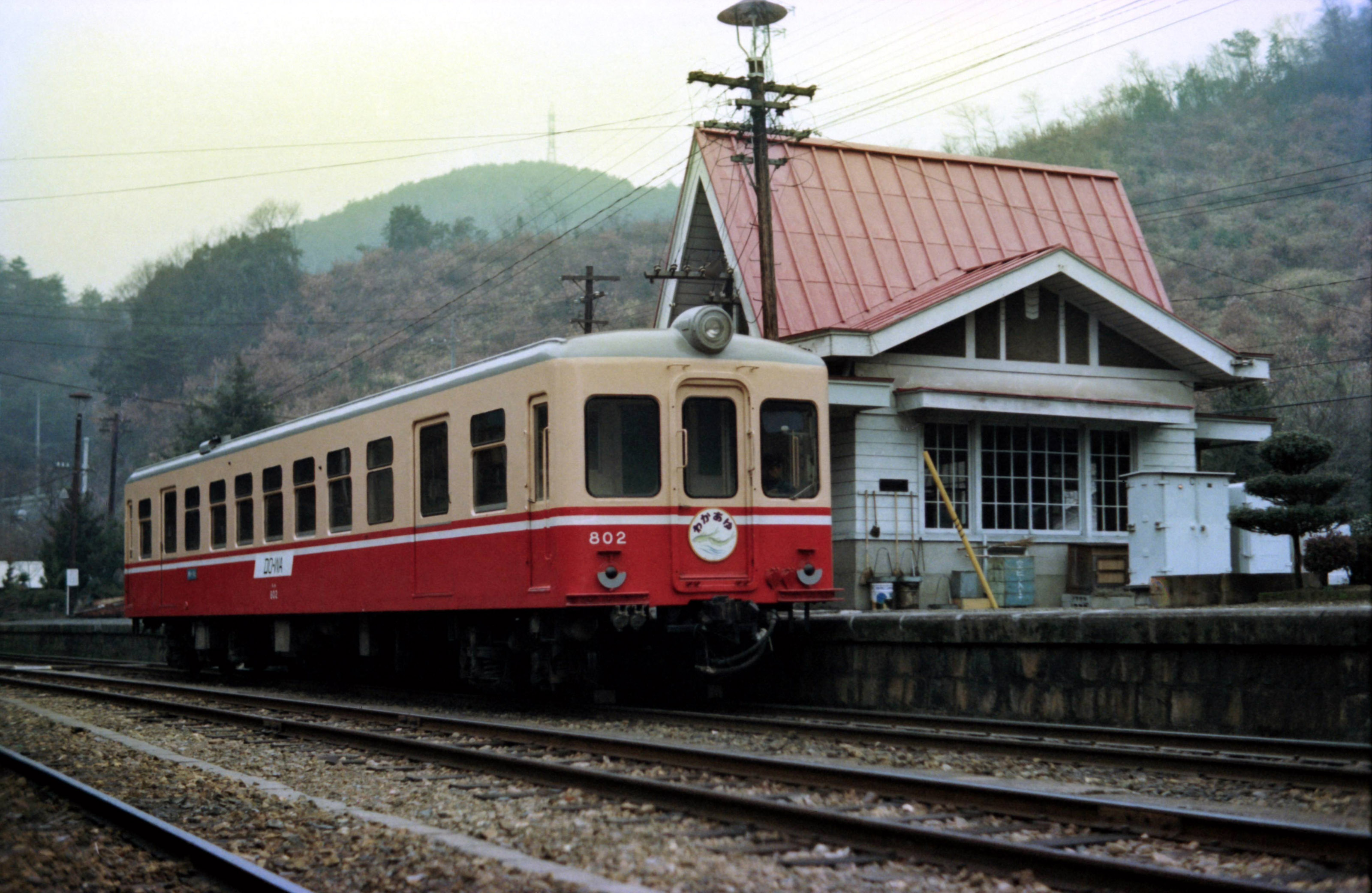 片上鉄道 802 柵原駅 S56年頃